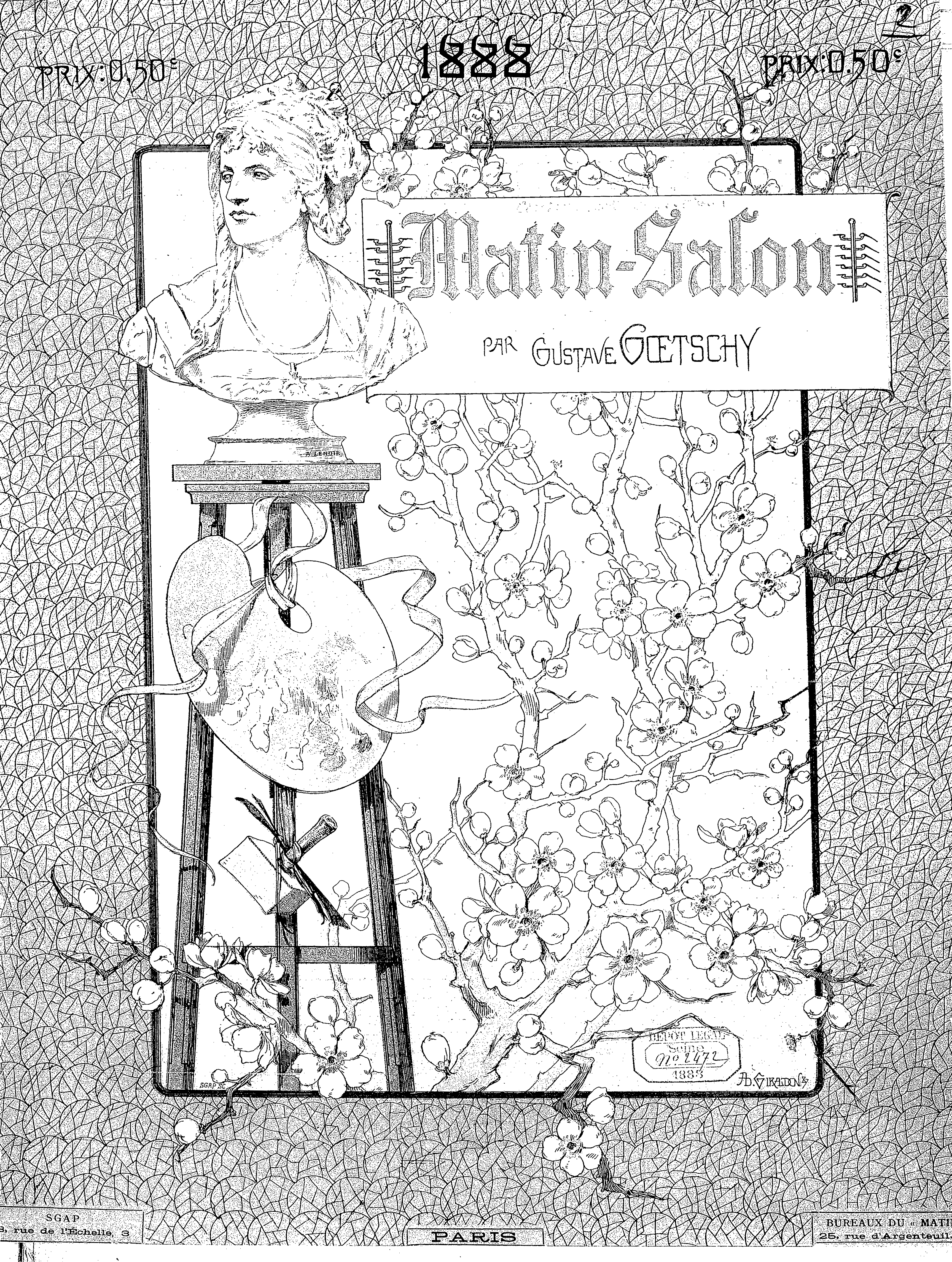 Couverture de Matin-Salon, par Gustave Goetschy, 1888. Buste de Alfred Lenoir, encadrement d'Adolphe Giraldon.